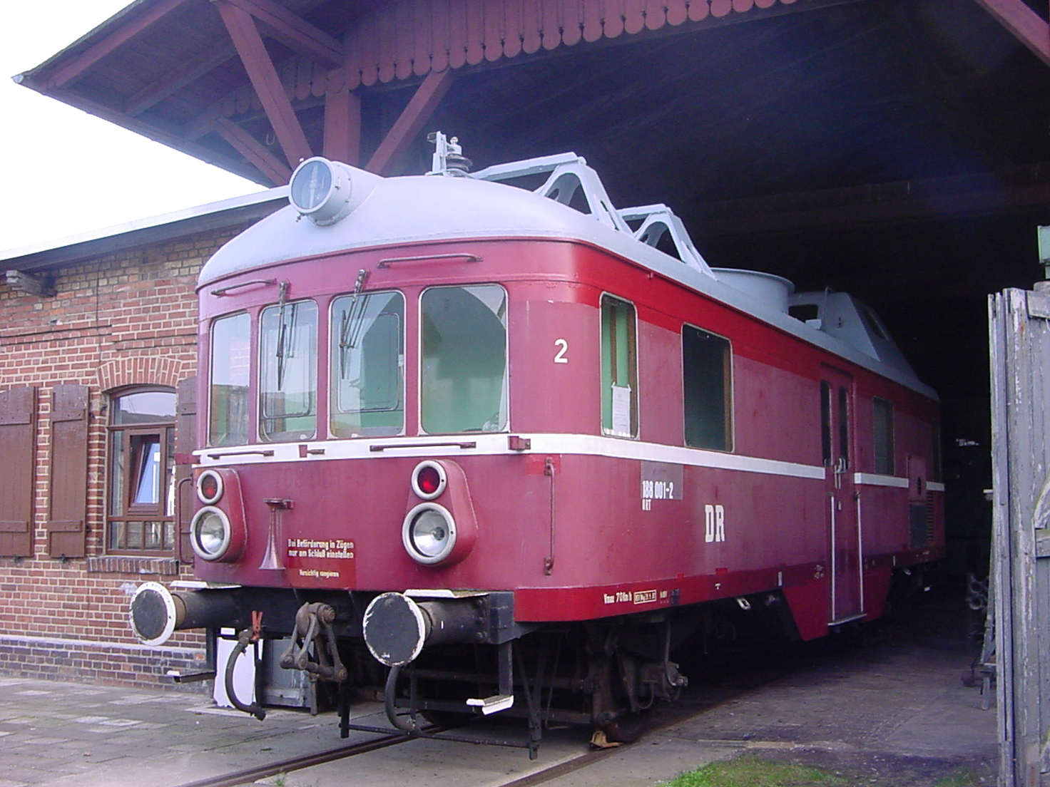 ORT 188 001 in Staßfurt Leopoldshall